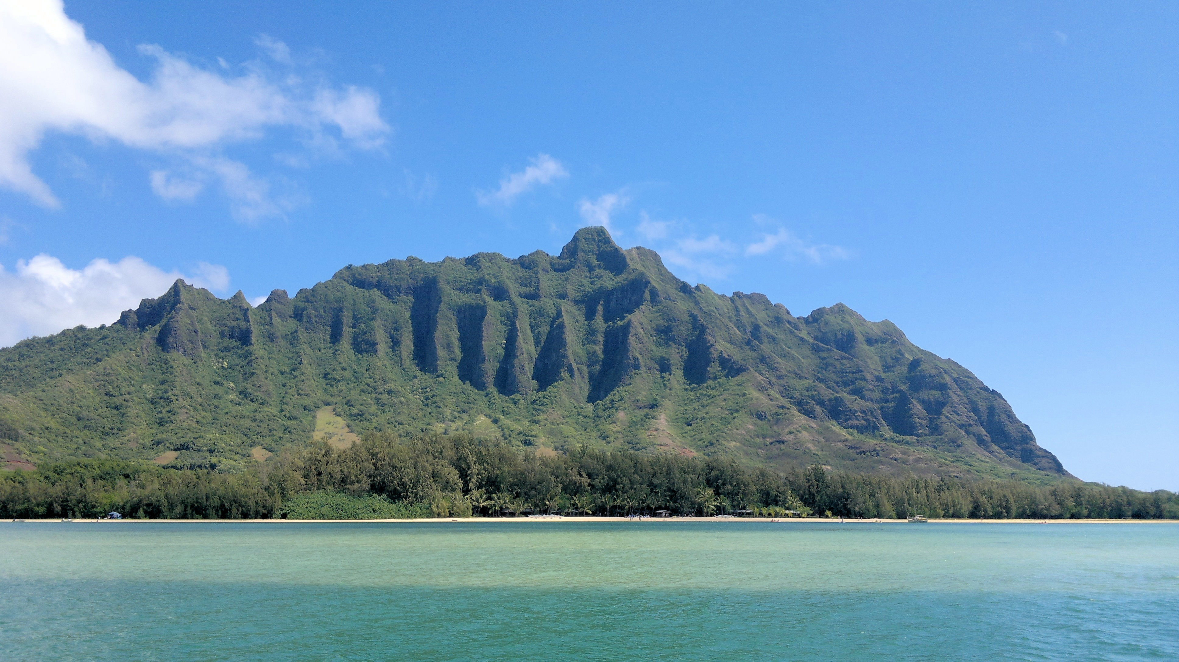 Die Kaneohe Bucht auf Oahu, Hawaii